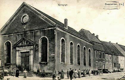 Synagogue de SarreUnion vers 1900